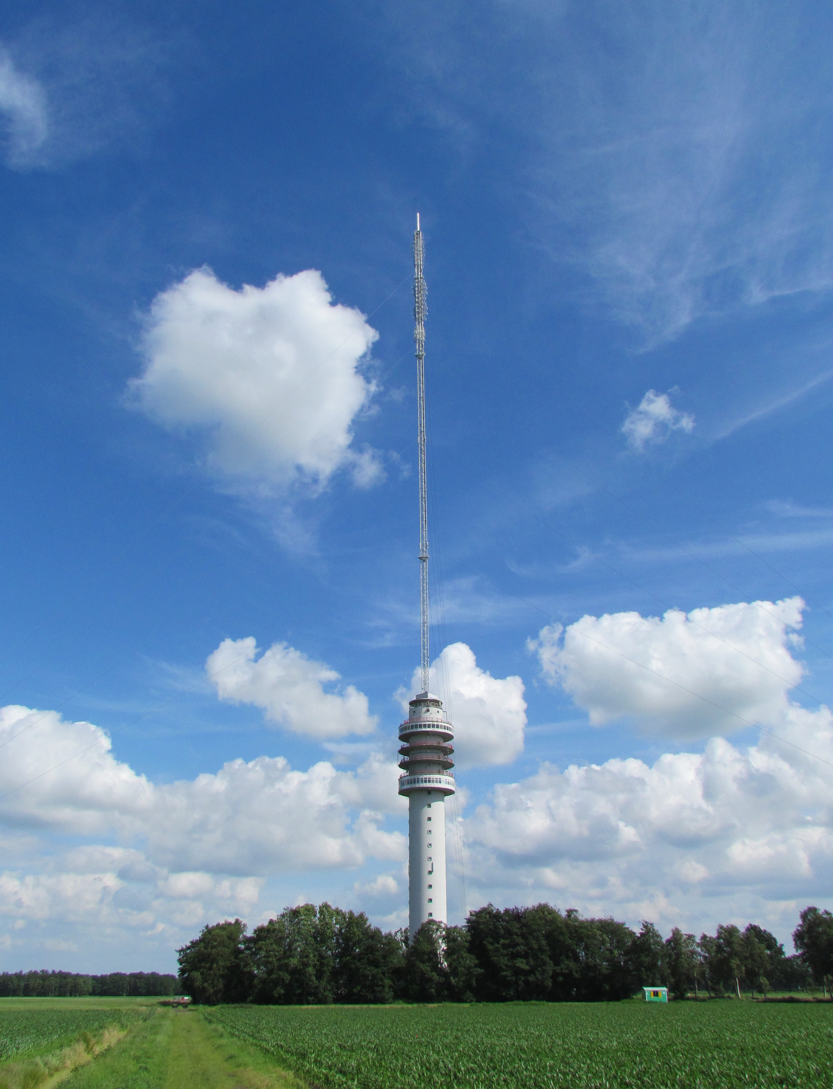 Zendstation Smilde in juni 2012, na het bereiken van het hoogste punt (14 mei) bij de herbouw van de mast, waarvan het stalen gedeelte op 15 juli 2011 instortte